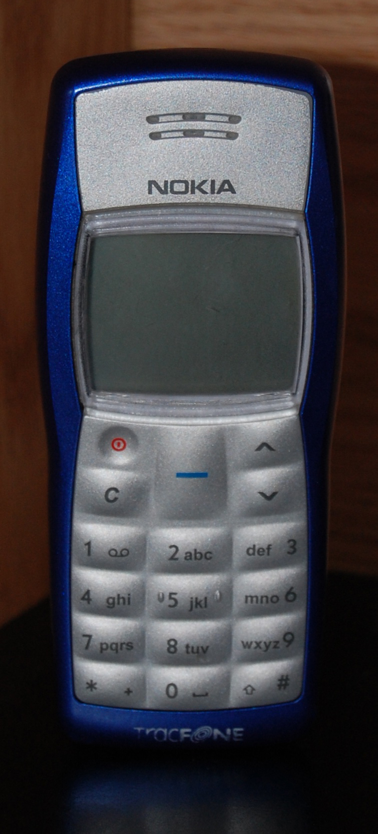 Nokia 1100. Kiswahili: Simu ya Nokia 1100. Nokia 1101.